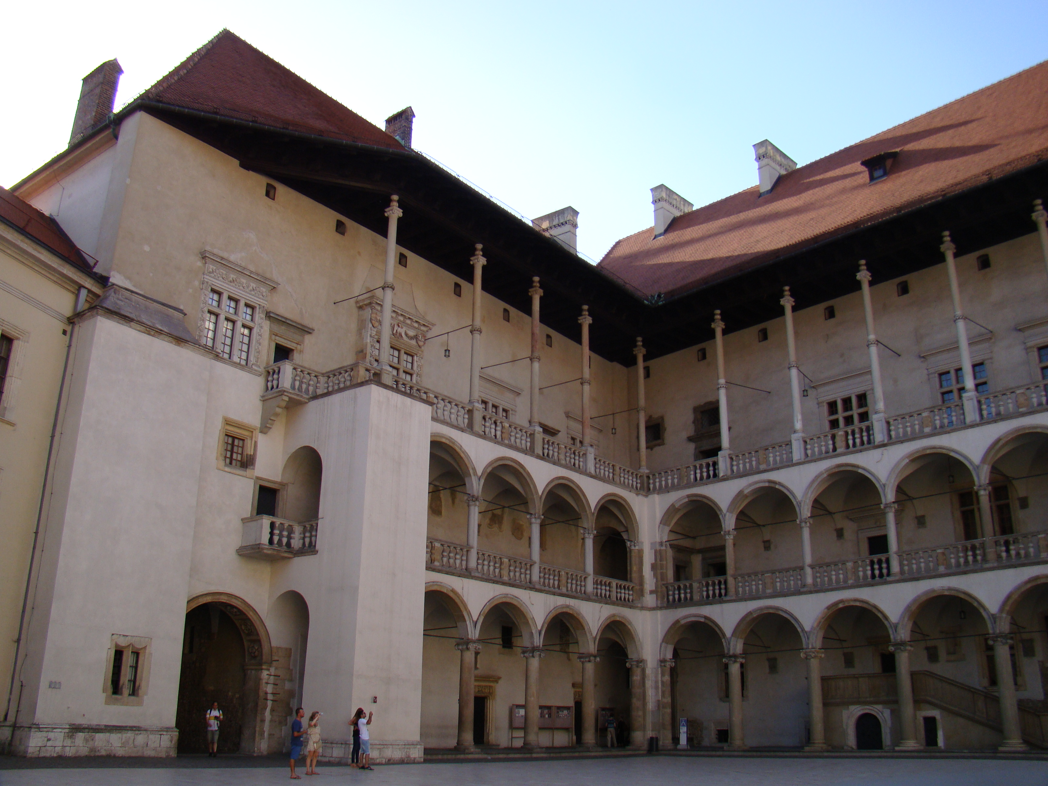 Kraków, zamek królewski